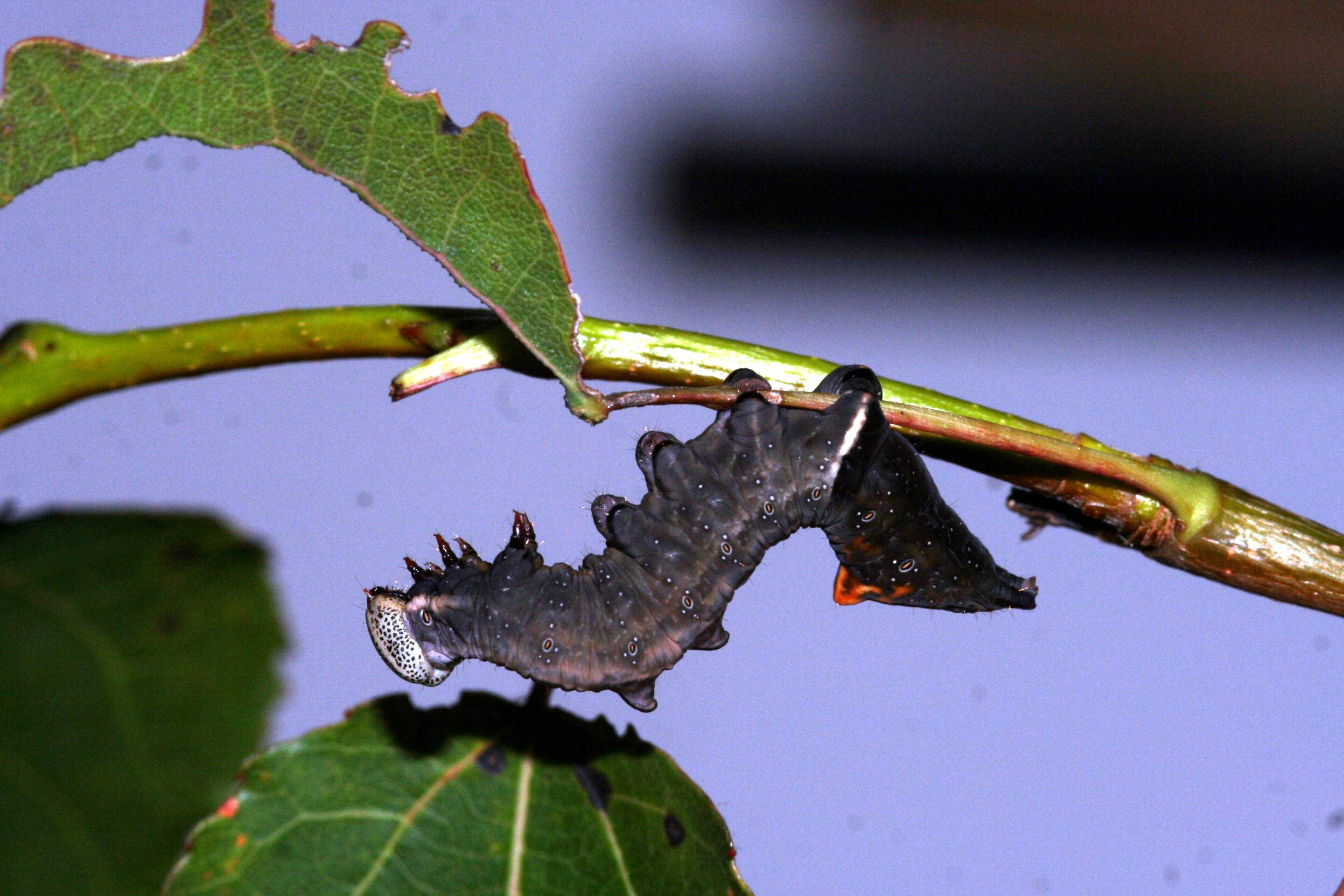 Raupe des Notodonta torva, Deutschland, Bayern, Spatenbräufilz Lkr Bad-Tölz/Wolfratshausen, Zitterpappel, 22.August 2008